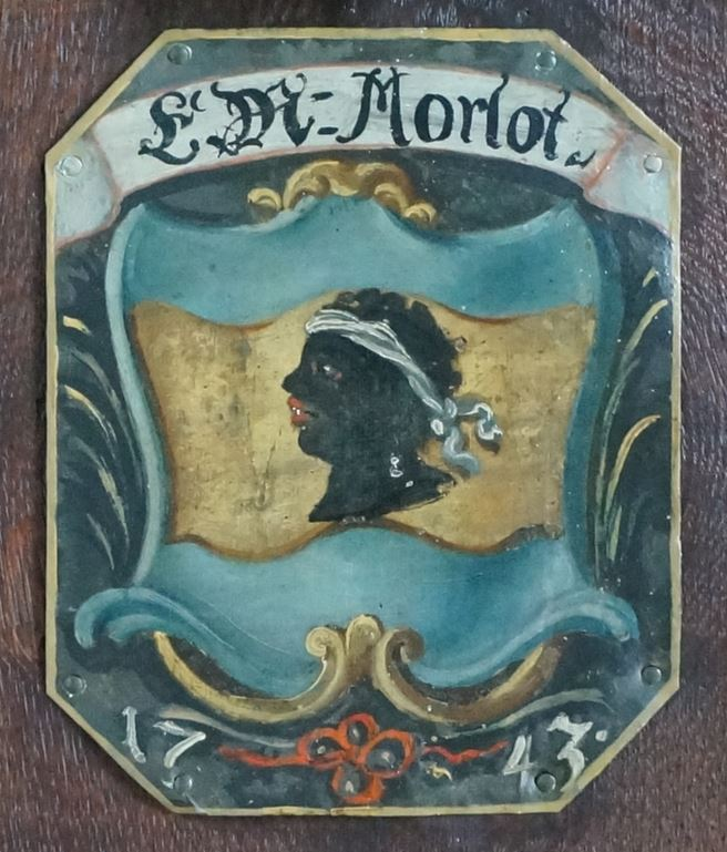 Waldau (Anlage ehemaliges Siechen- und Blatternhaus), Siechenkapelle, Detail Chorgestühl